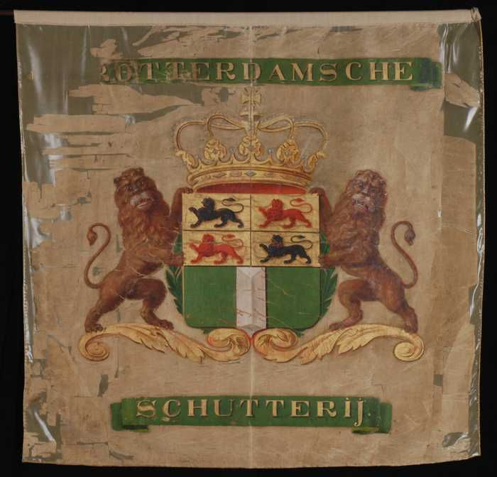 voormalig vaandel van de Rotterdamsche Schutterij